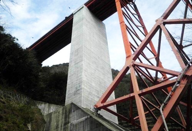 平成6年に竣工した干支大橋の橋脚耐震工事である。橋脚の高さが50m以上あり、コンクリート打設量も多いことからコンクリート品質確保の課題を様々な工夫で克服したことに加え、建設産業の担い手確保や土木工事の魅力を伝える取り組みを積極的に実施しており、工事全般にわたり他の工事の模範となる工事と評価された。 宮崎県延岡市北方町干支大橋